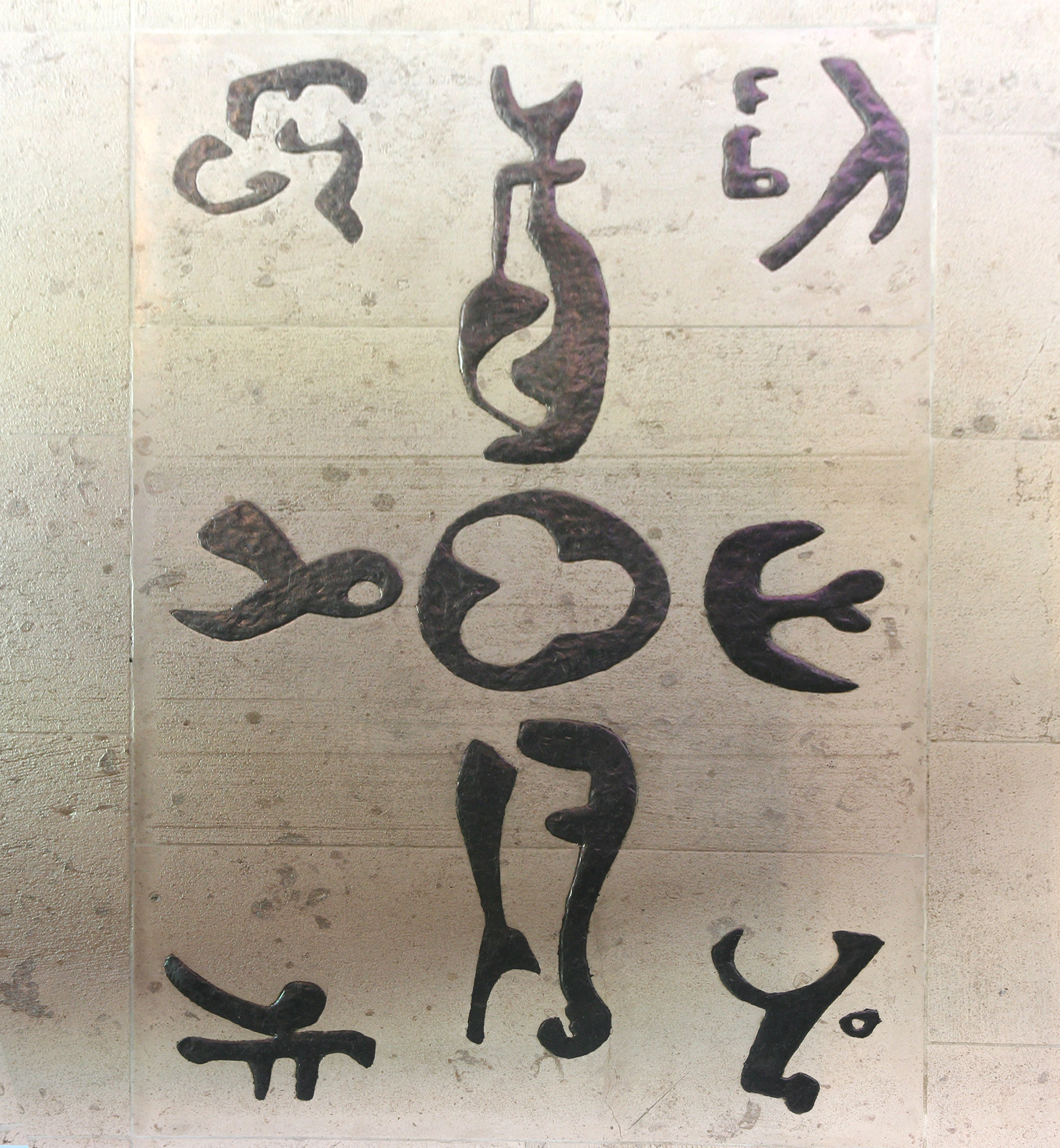 Römisch-katholische Kirche Bruder Klaus Basel, Teppich im Altarraum von Hans Christen